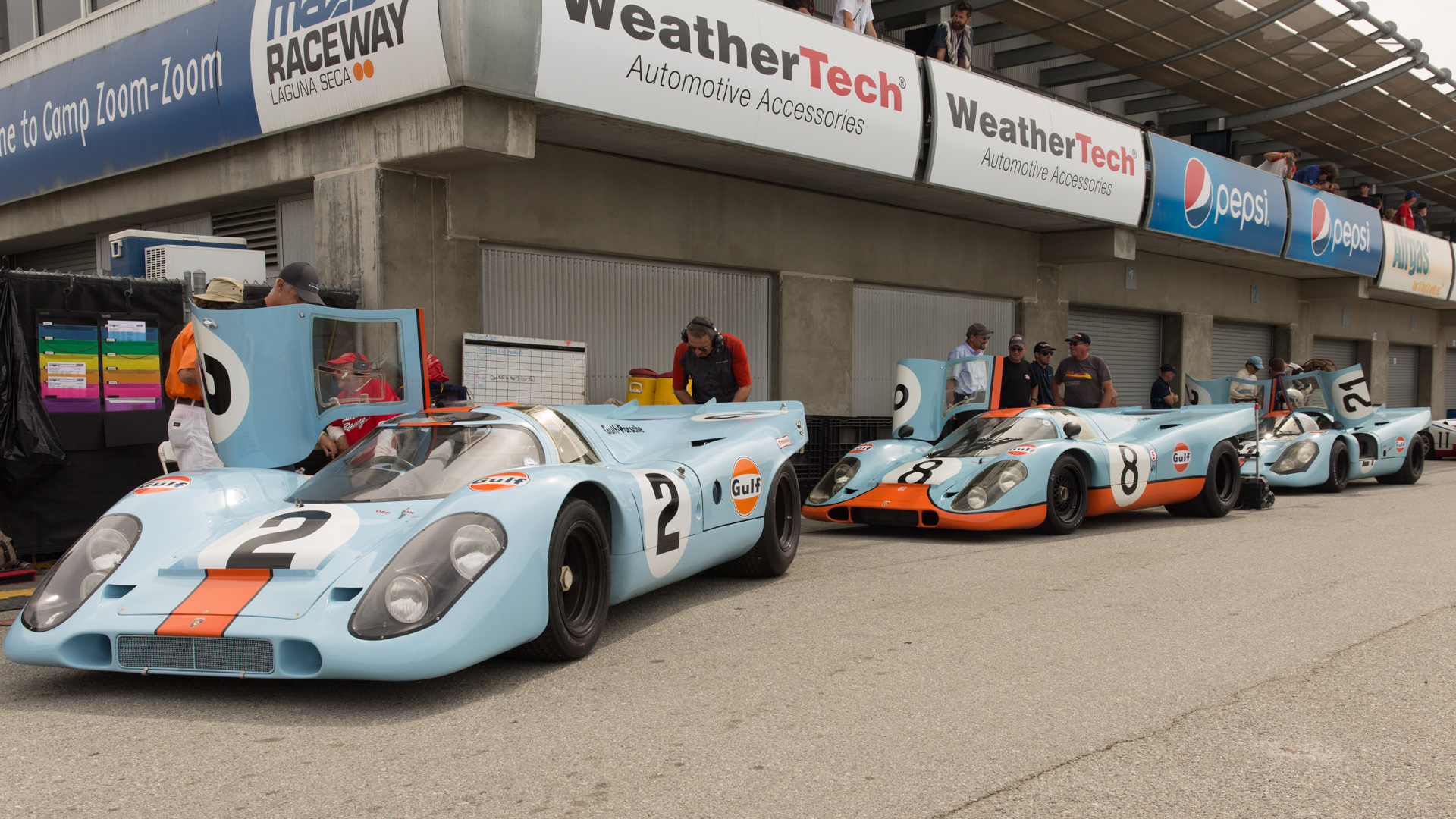 Rennsport Reunion V